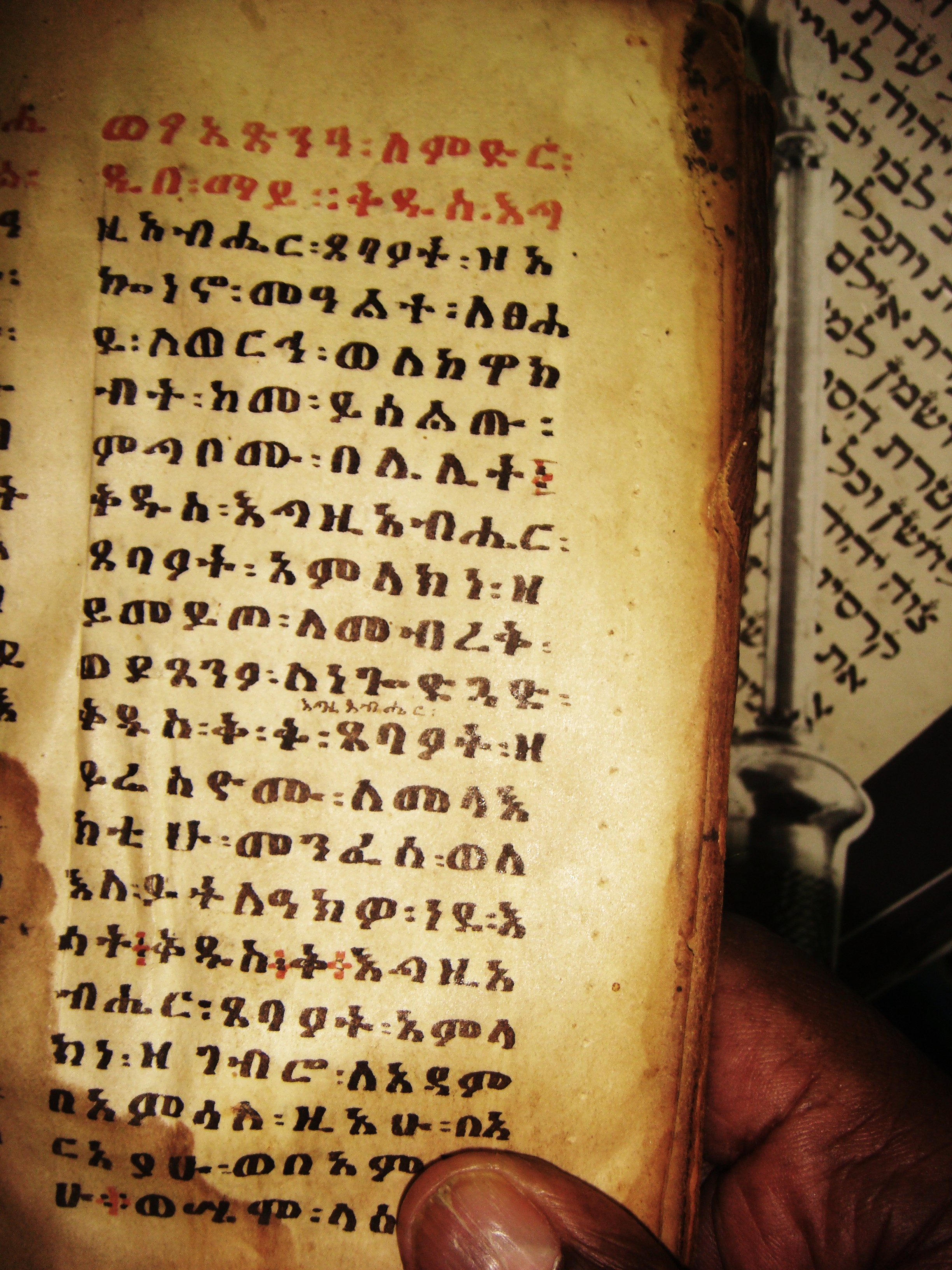 beta israel ancient holly book